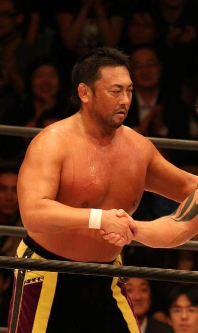 Toshiaki Kawada and Zeus shaking hands